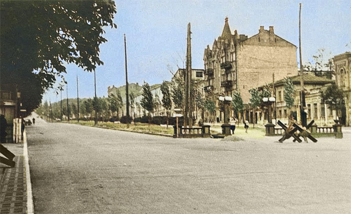 Прибутковий будинок, Київ, бульвар Тараса Шевченка, 31